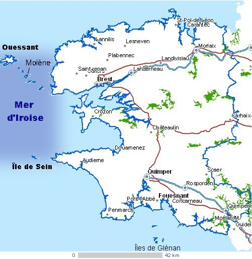 Carte de la mer d'Iroise au large du département Finistère (France). Légende pour la carte originale